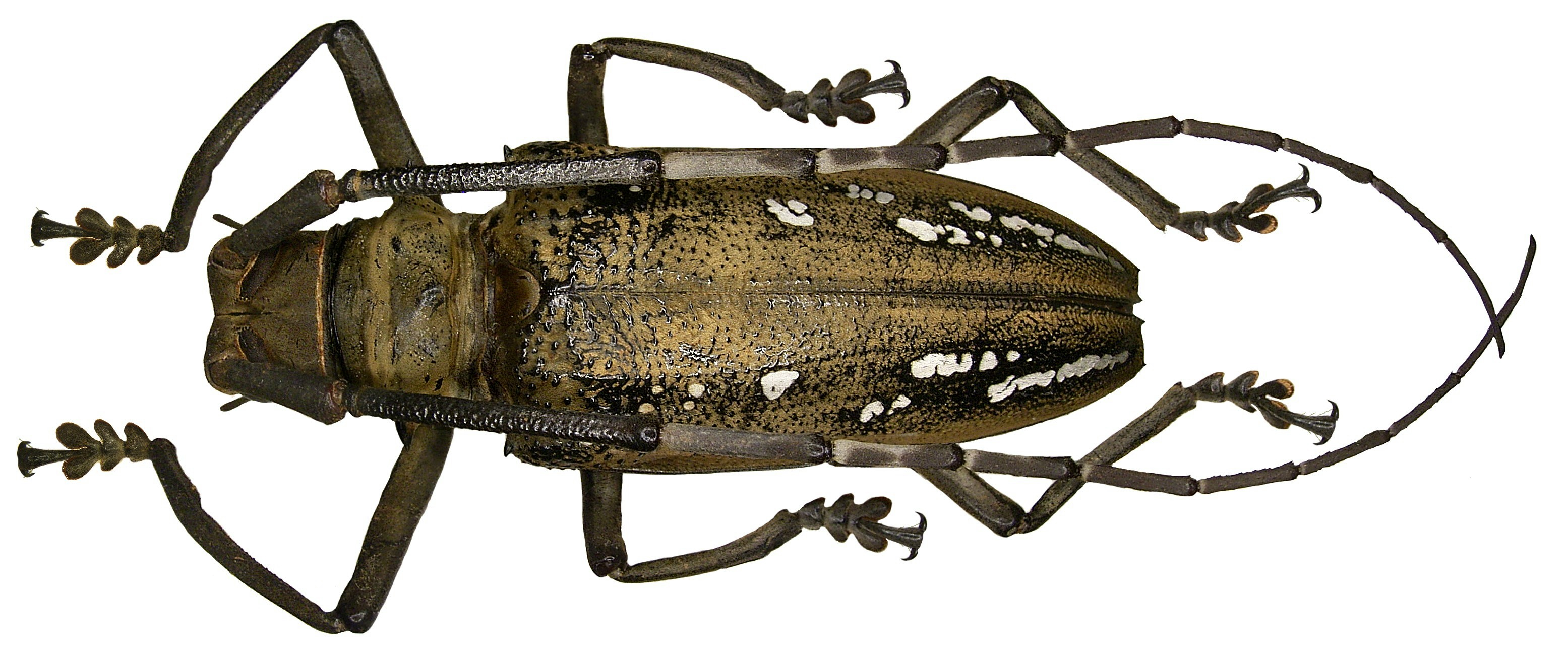 Familie: Cerambycidae Größe: 43-82 mm Vorkommen: Neuguinea, Aru Island, Key Island, Horn Island, Cape York Fundort: Indonesien, Irian Jaya, Batanta-Island leg.det. A.Skale, 2004 Foto: U.Schmidt, 2008